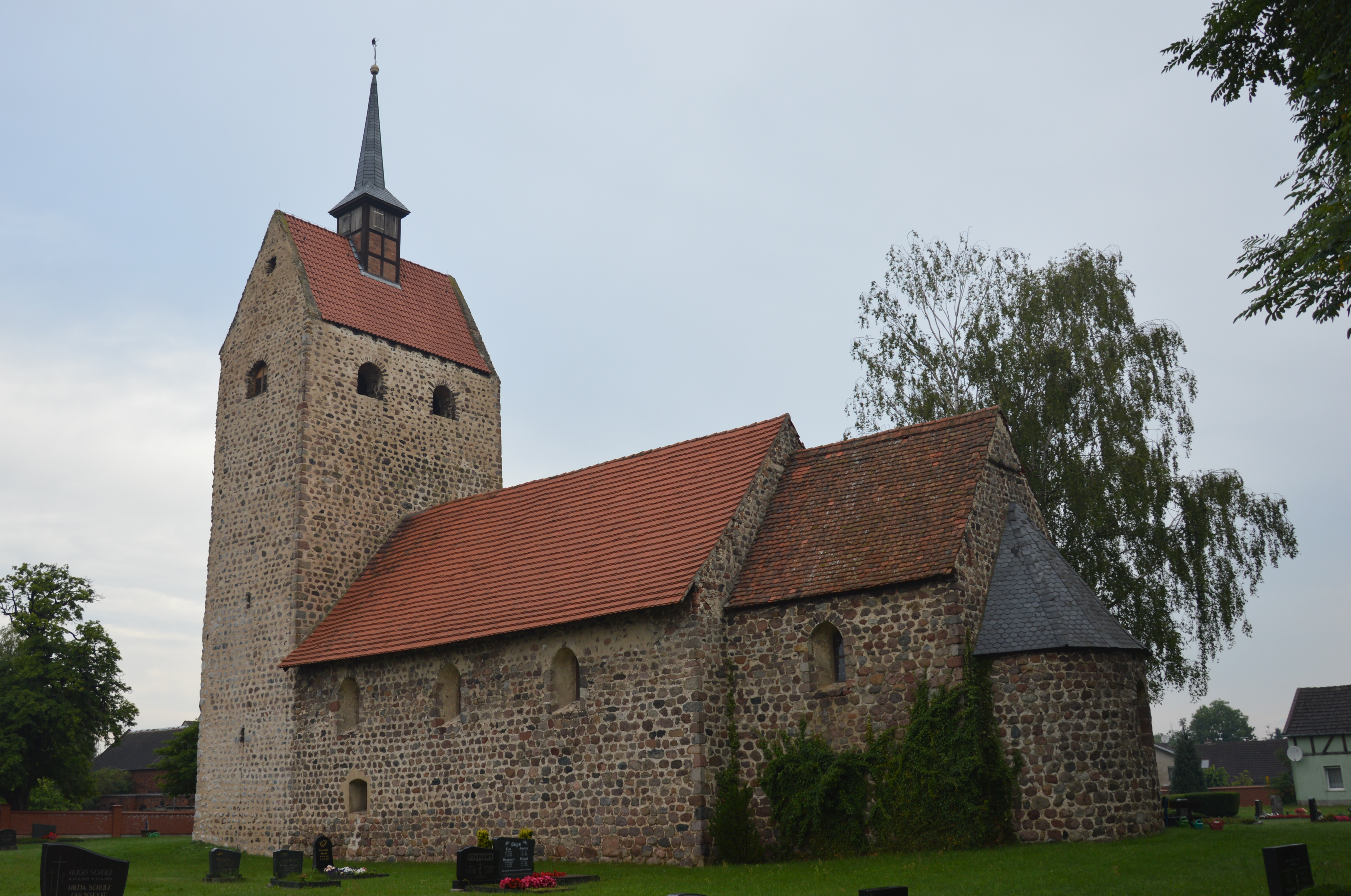 Dorfkirche Winterfeld